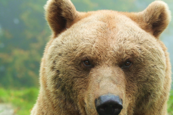 Vinzenz wurde 1988 in Slowenien geboren. Er und seine Schwester Liese lebten 9 Jahre in einer 300m² Betongrube als Touristenattraktion, bevor sie 1998 in den BÄRENWALD Arbesbach übersiedelten. Foto:VIER PFOTEN/Knöpfer